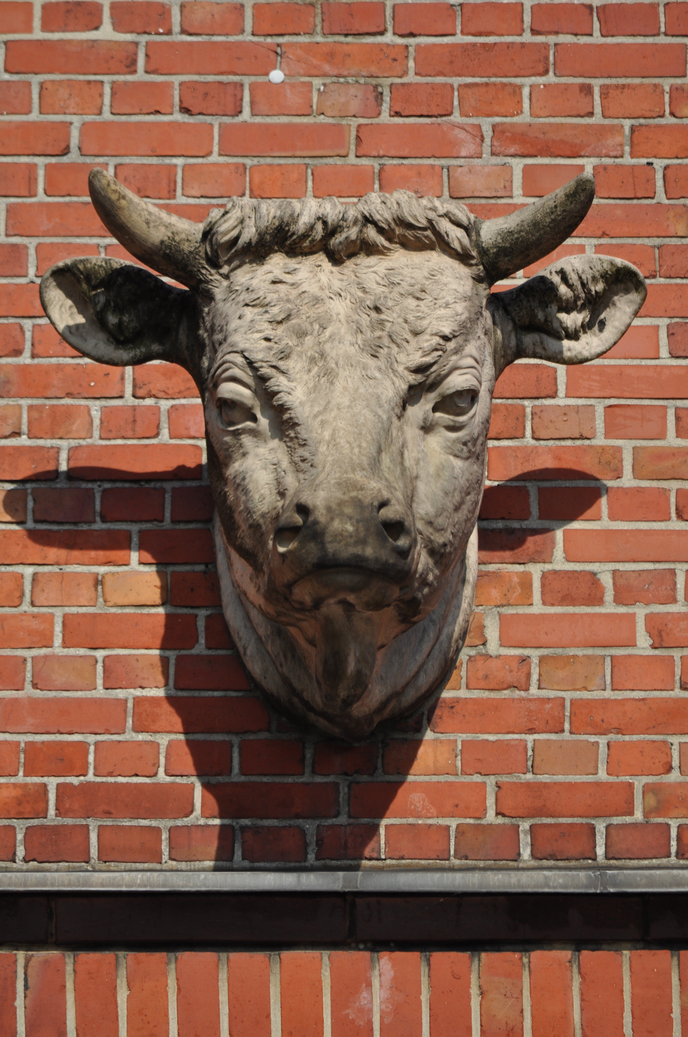 Rinderkopf am Kopfbau der ehemaligen Margarinefabrik Voss an der Bramfelder Straße 138 in Hamburg-Barmbek-Nord This is a photograph of an architectural monument.